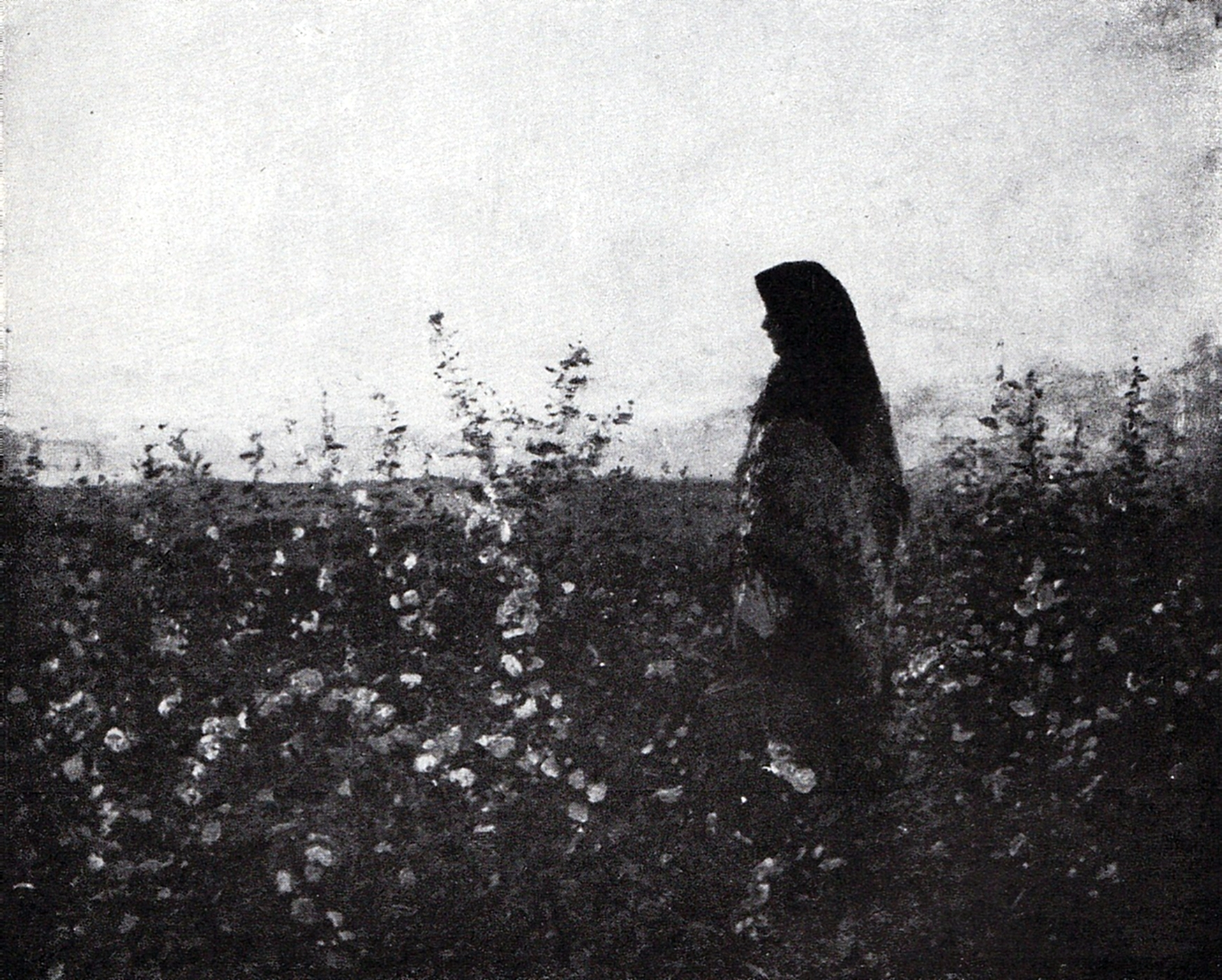 Fată cu ulcior care a fost cunoscută inițial sub numele Între nalbe